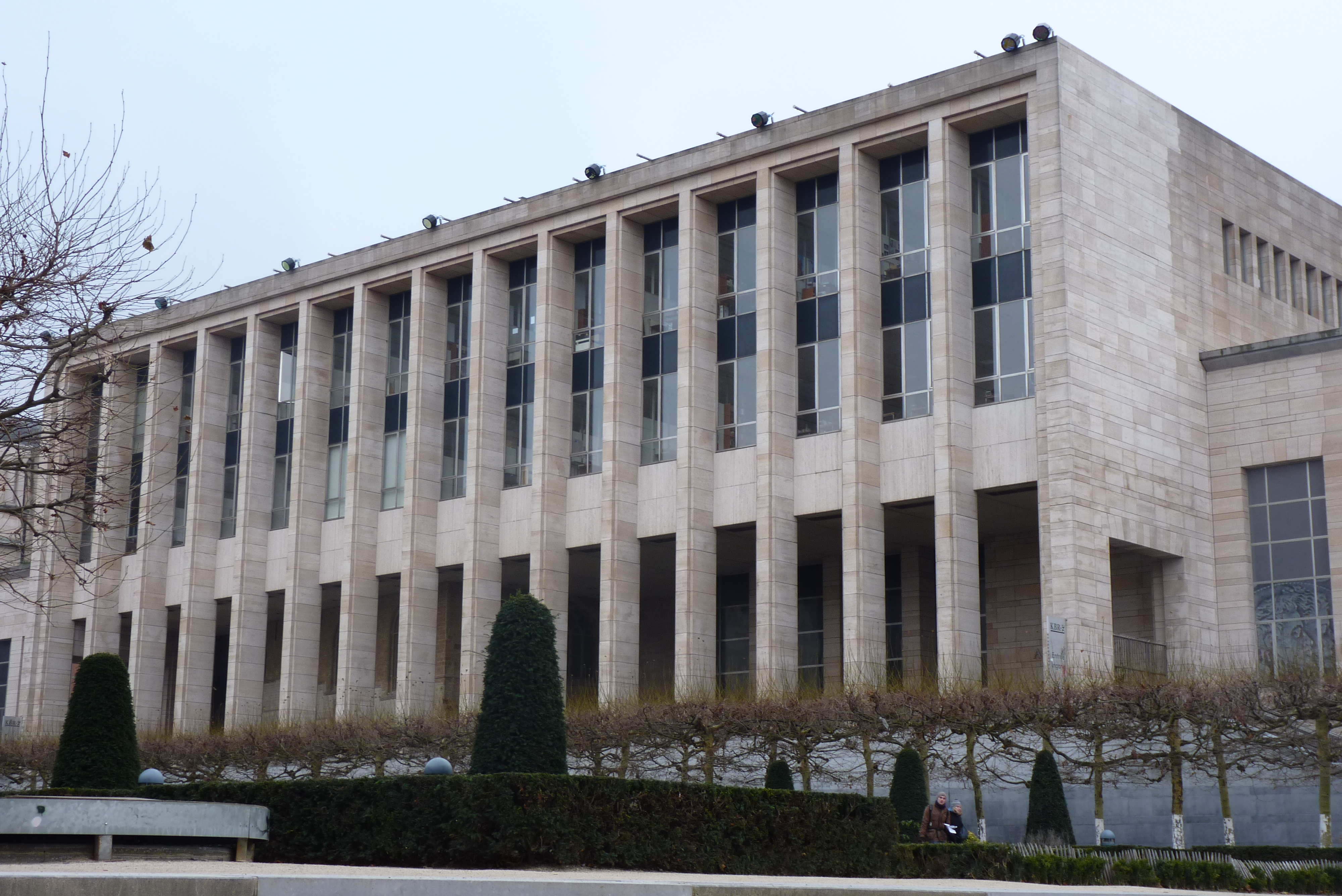 Bibliothèque Royale de Belgique, à Bruxelles.